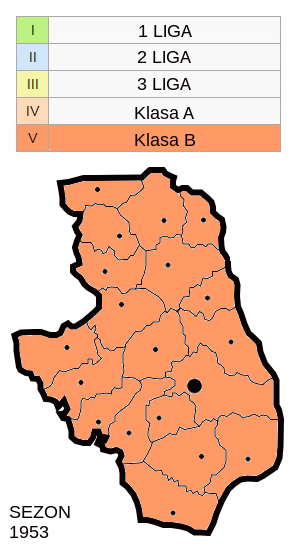 Jagiellonia w sezonie 1953 - mapa klubów